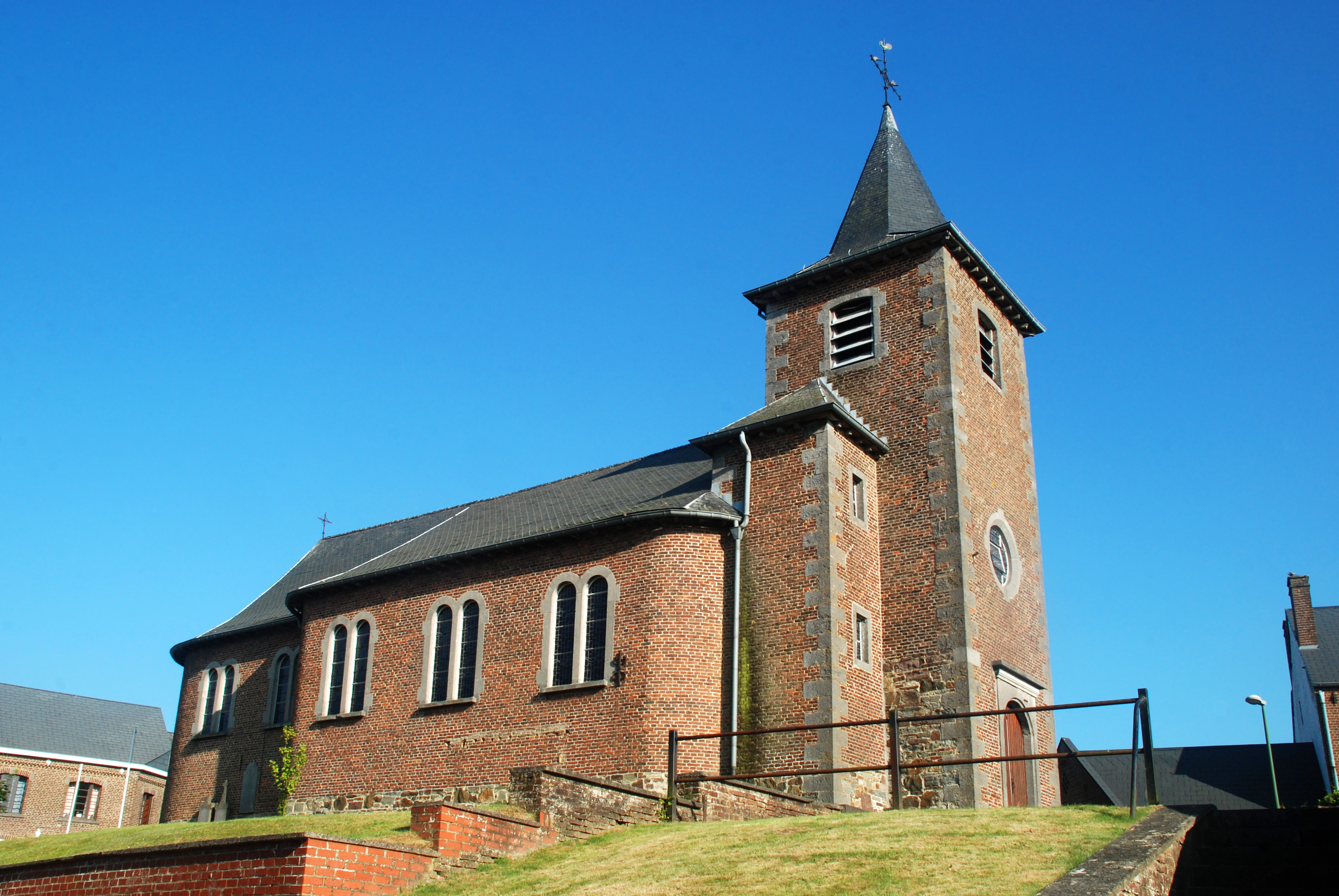 Belgique - Brabant wallon - Chastre - Cortil-Noirmont - Église Saint-Pierre de Noirmont